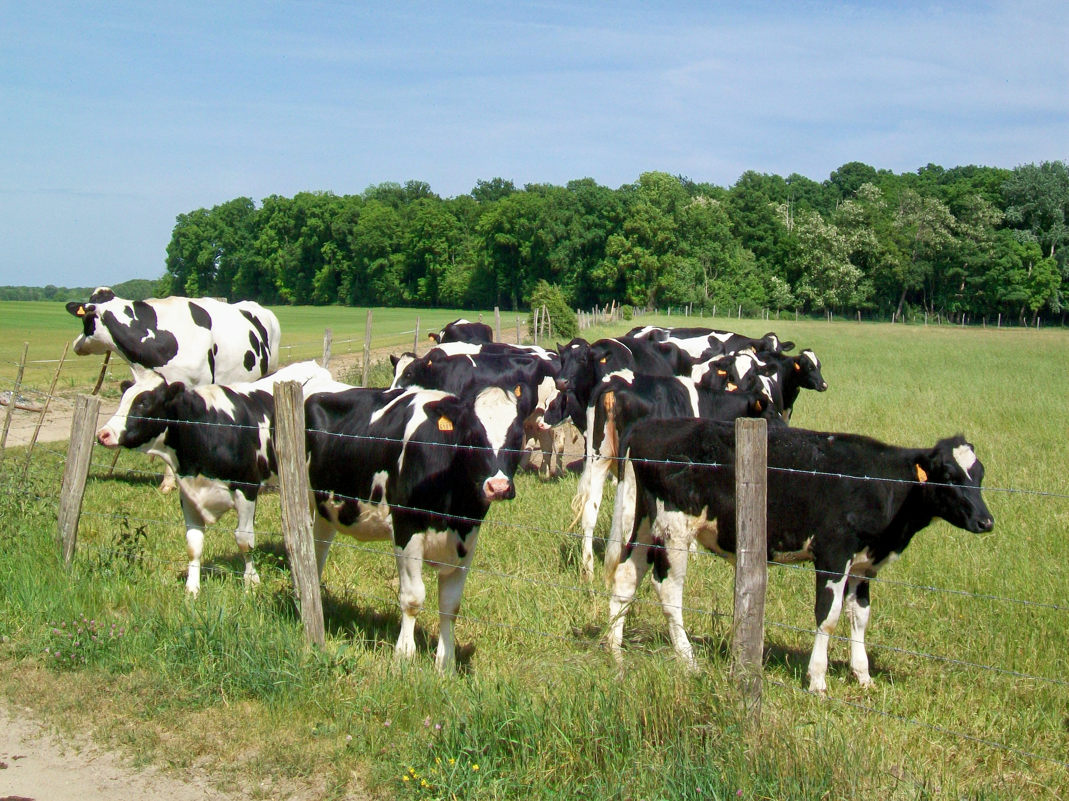 Les vaches sont devenues rares au sud de l'Oise ; dans la commune de Pontarmé, on peut encore en voir. Ici, sur le chemin rural de la Censière.